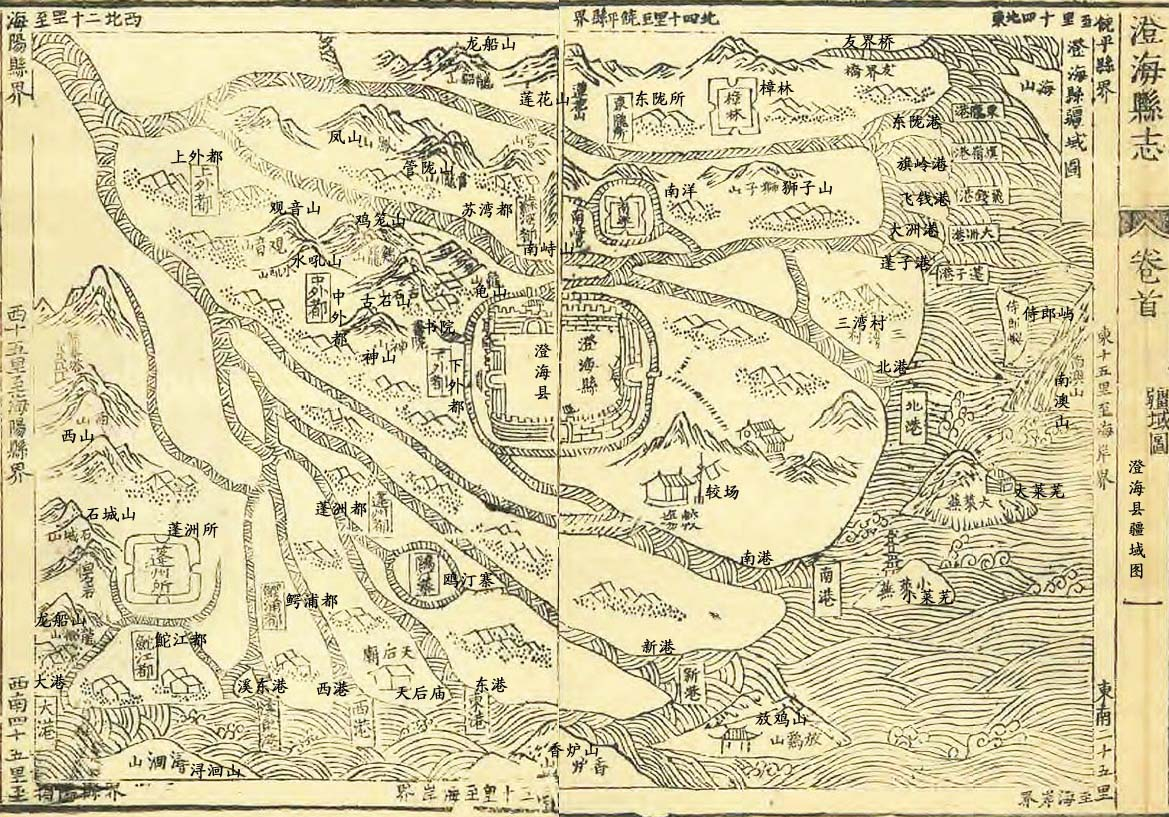 依嘉庆《澄海县志》舆图制作而成。